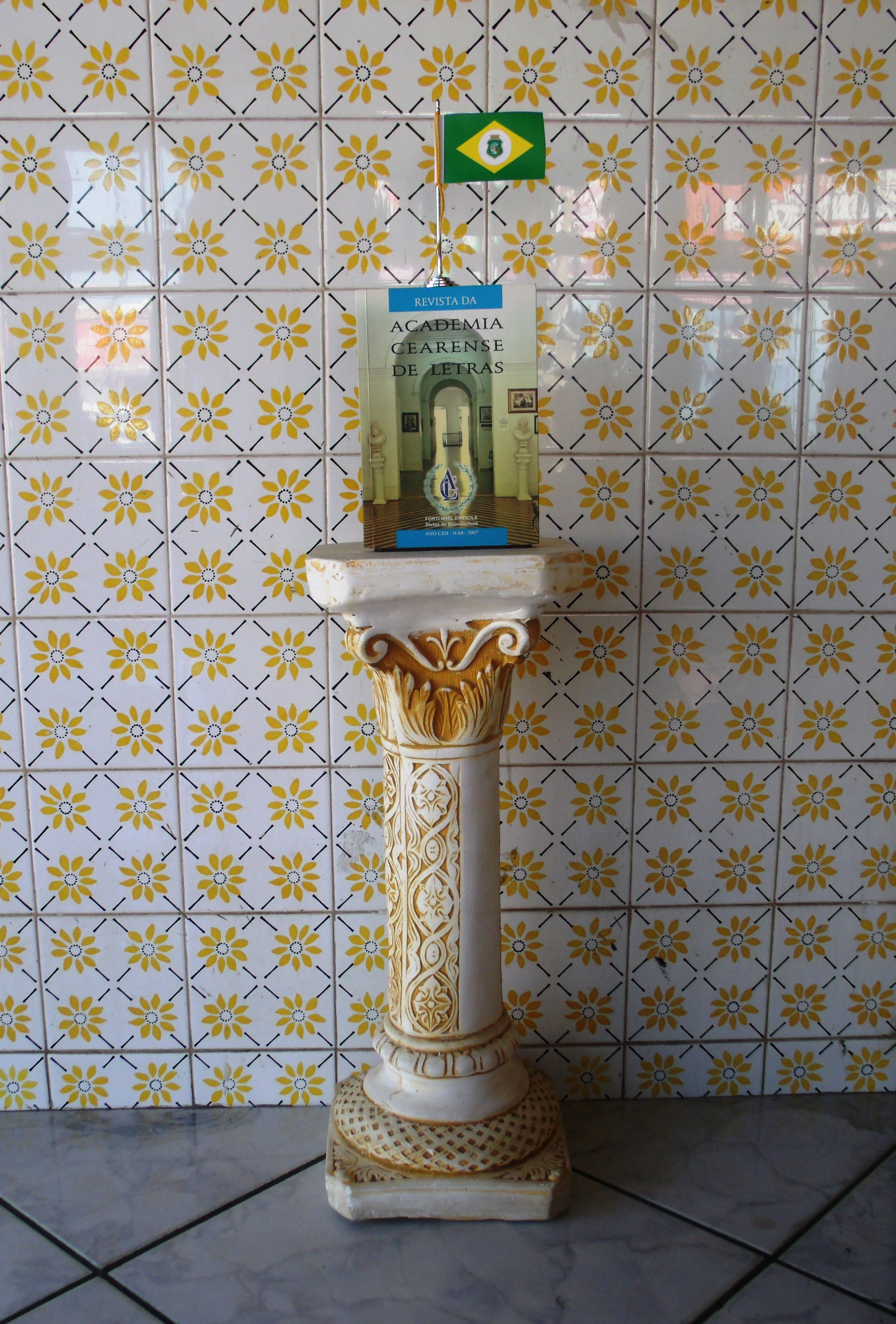 Coluna clássica de decoração encimada por ma revista da Academia Cearense de Letras e bandeira do estado do Ceará.